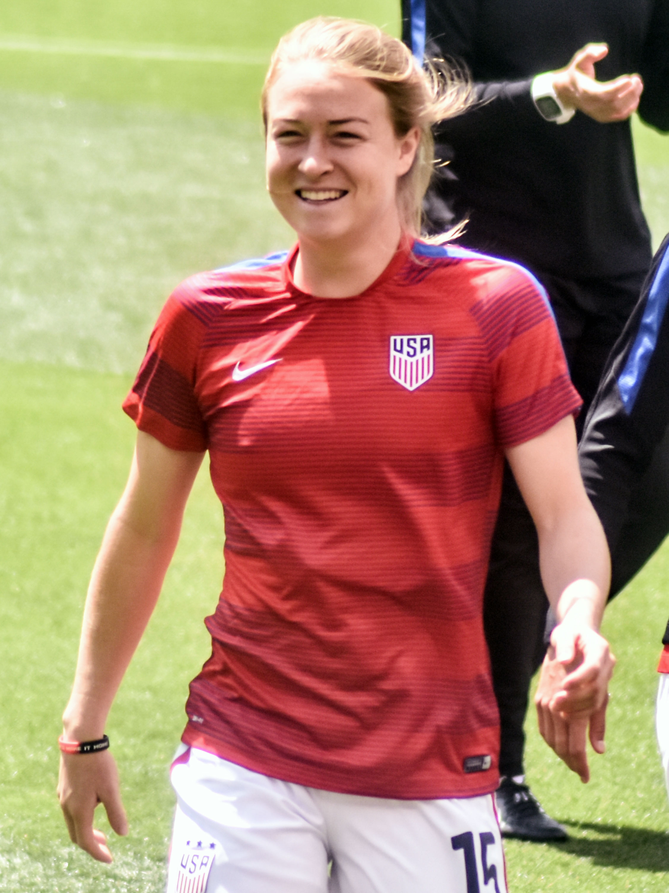 From Flickr user edrost88, match details here